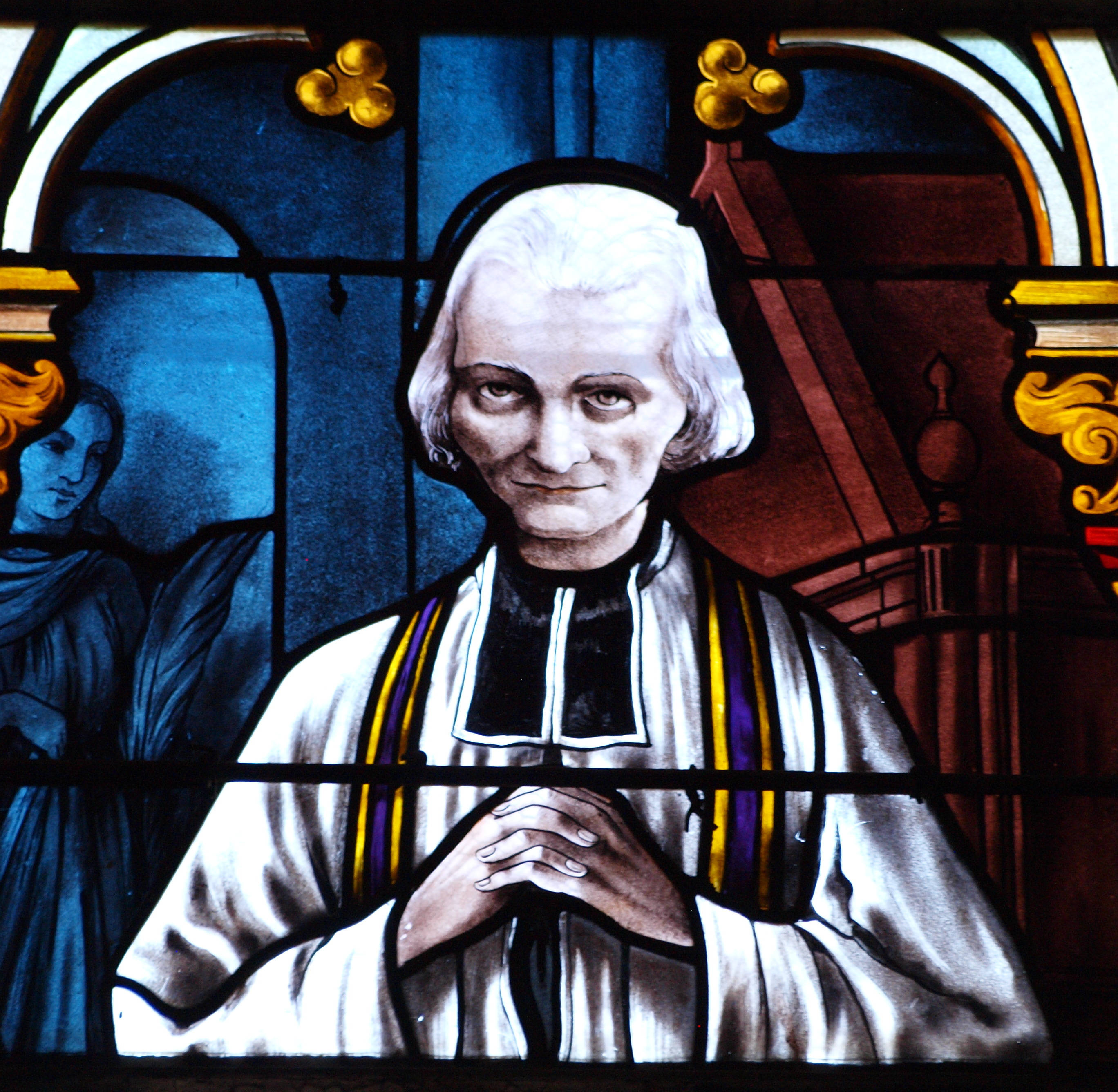 Mézilles (Yonne, France) ; vitrail de l'église Saint-Marien représentant le curé d'Ars